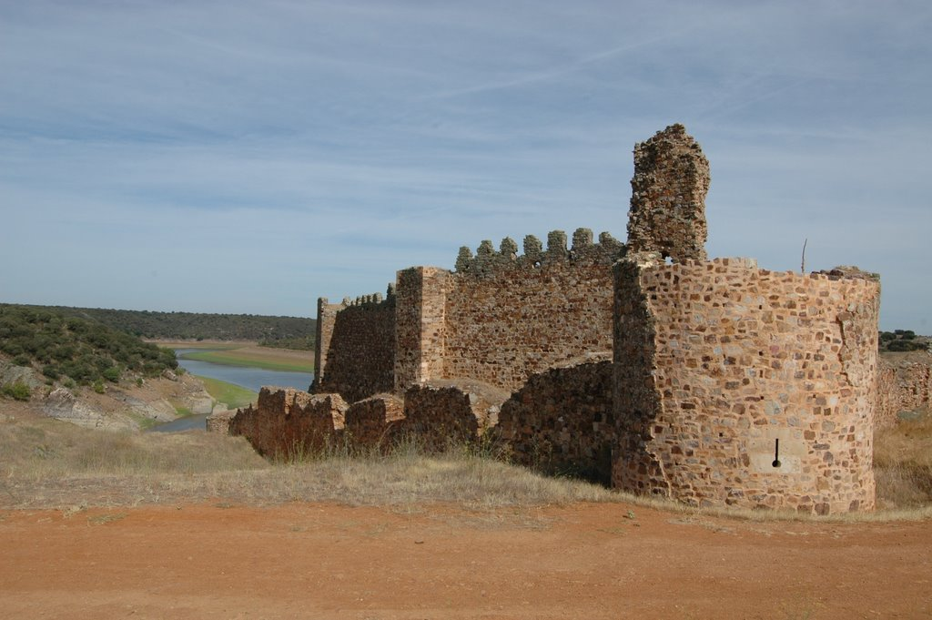 Ruïnes de Castrotorafe.